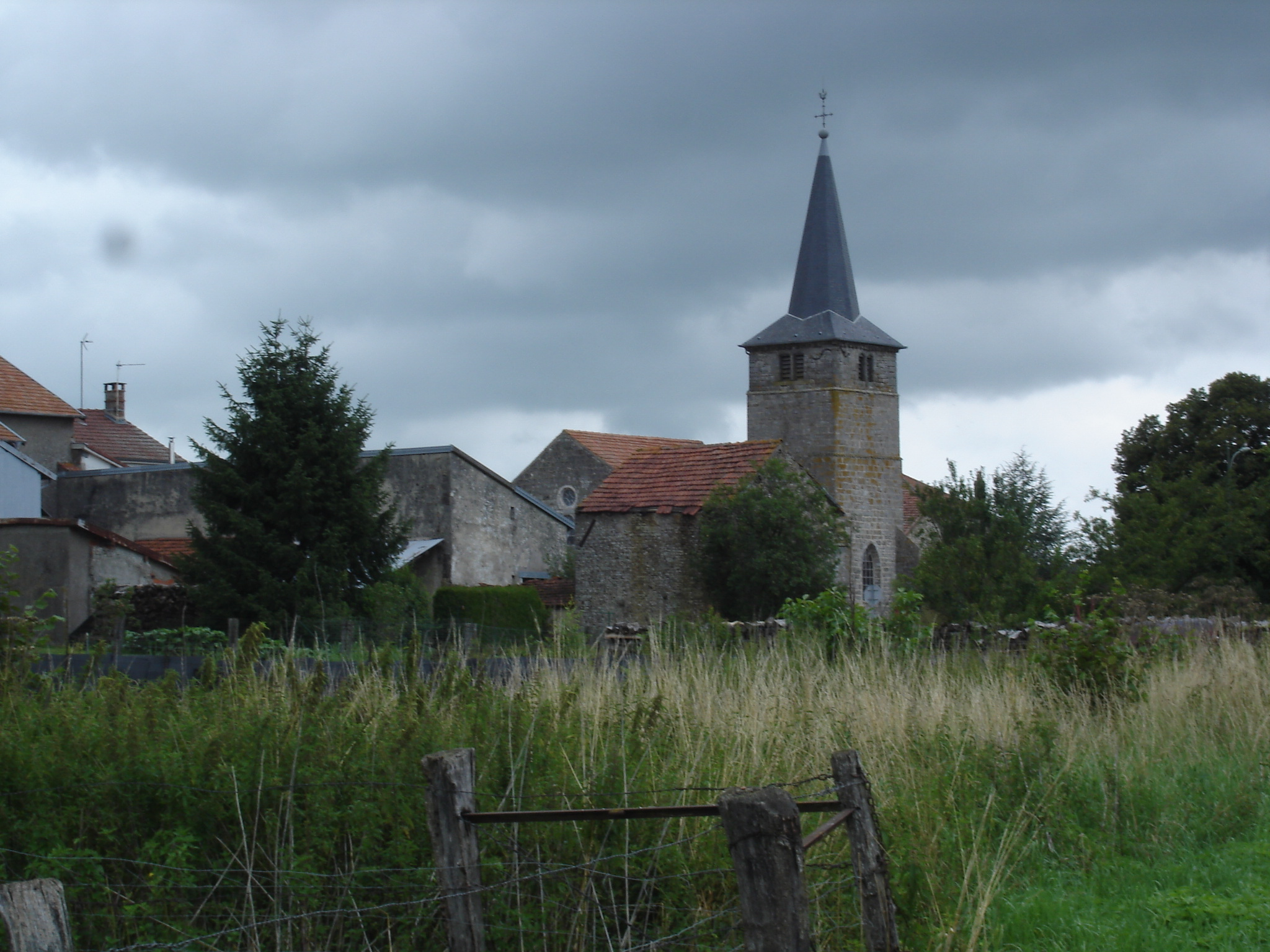 L'église et le village de Lénizeul, commune de Val-de-Meuse (Haute-Marne)